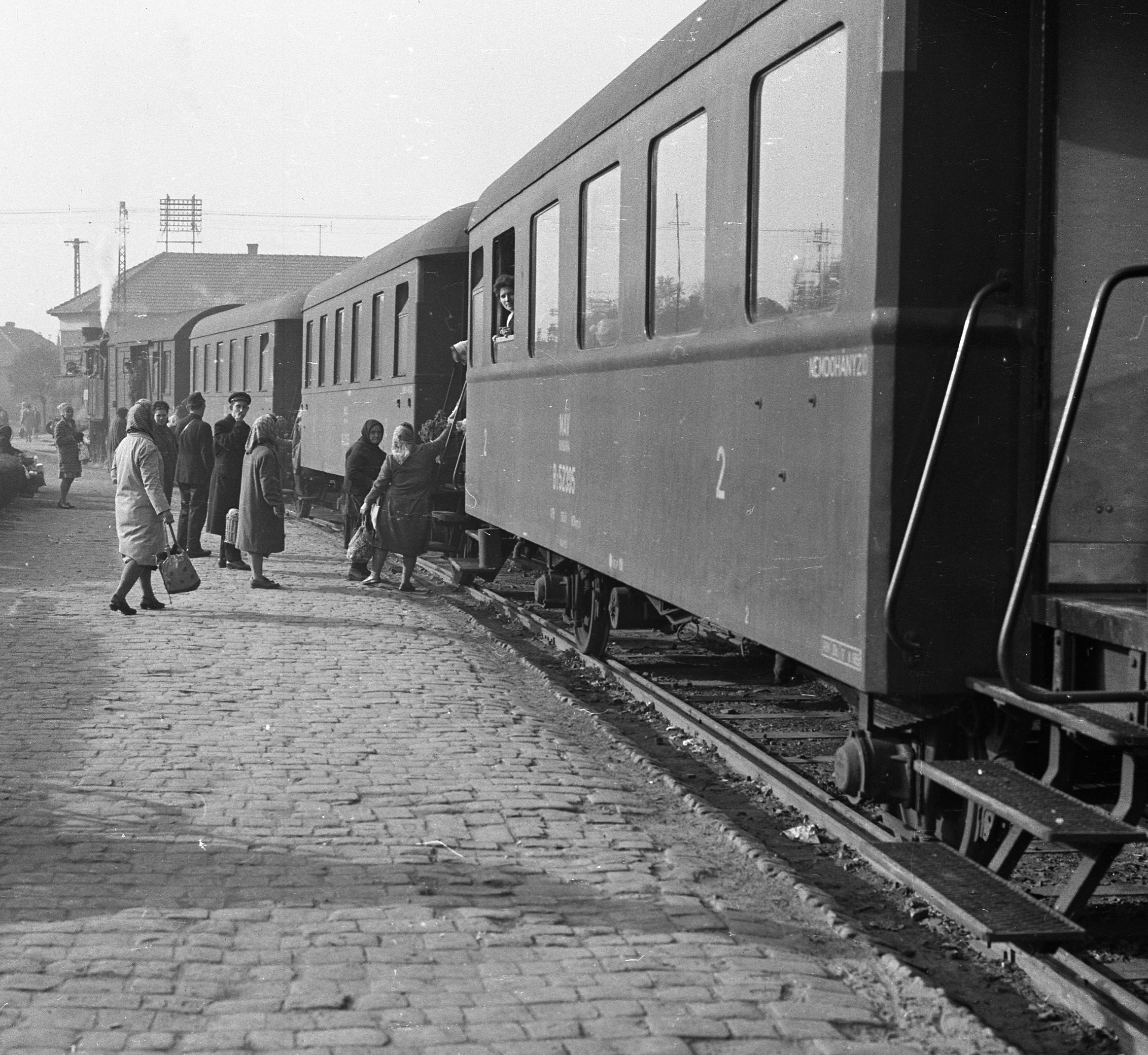 Kossuth téri vasútállomás. Location: Hungary, Cegléd Tags: railway, aerial wire Title: Kossuth téri vasútállomás.